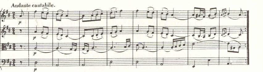 thema van 3e deel Beethoven opus 18.5